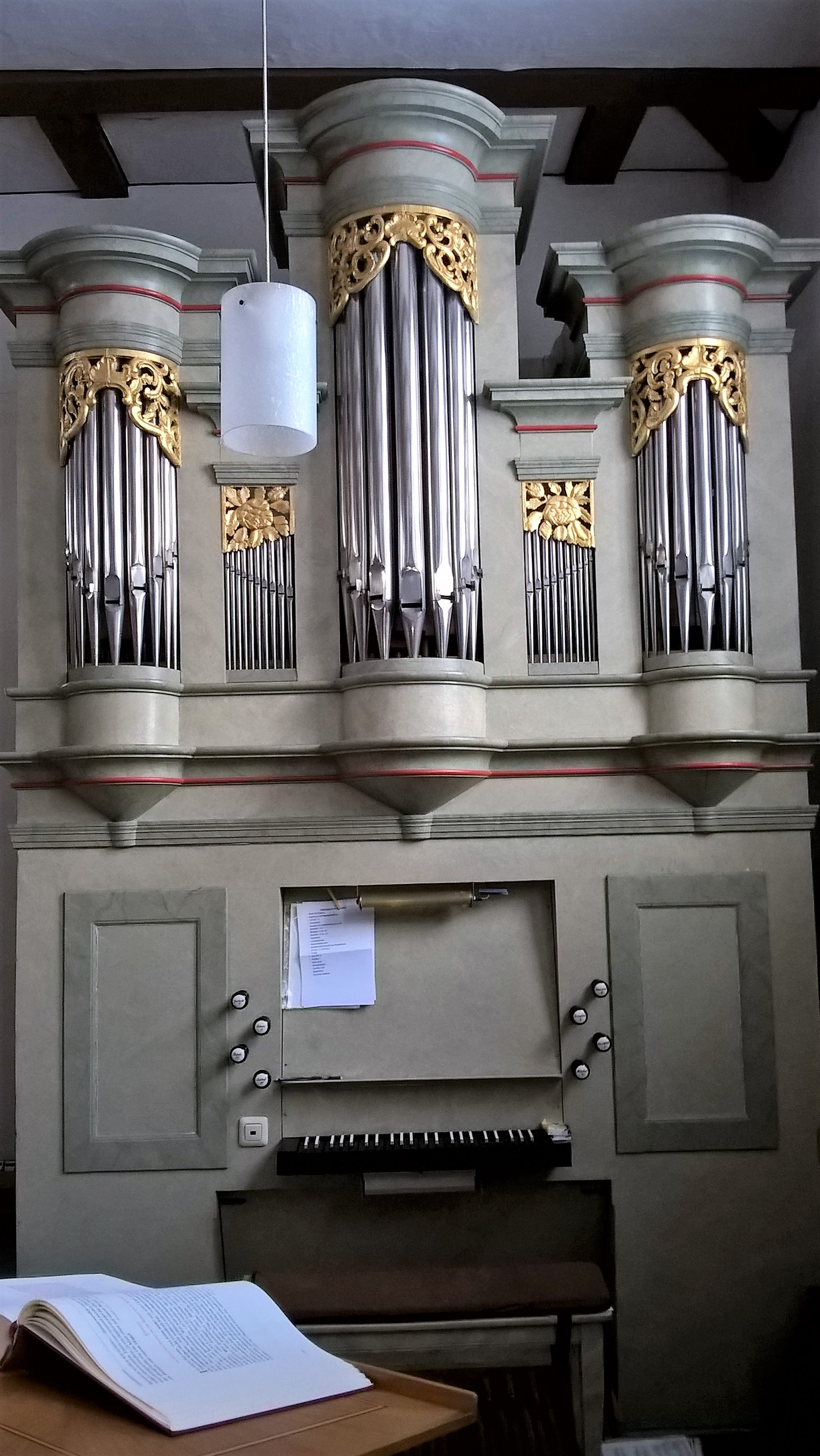 Evangelische Kirche Ilsdorf (ursprünglich Bernsfeld), Gemeinde Mücke, Vogelsbergkreis, Hessen, Deutschland